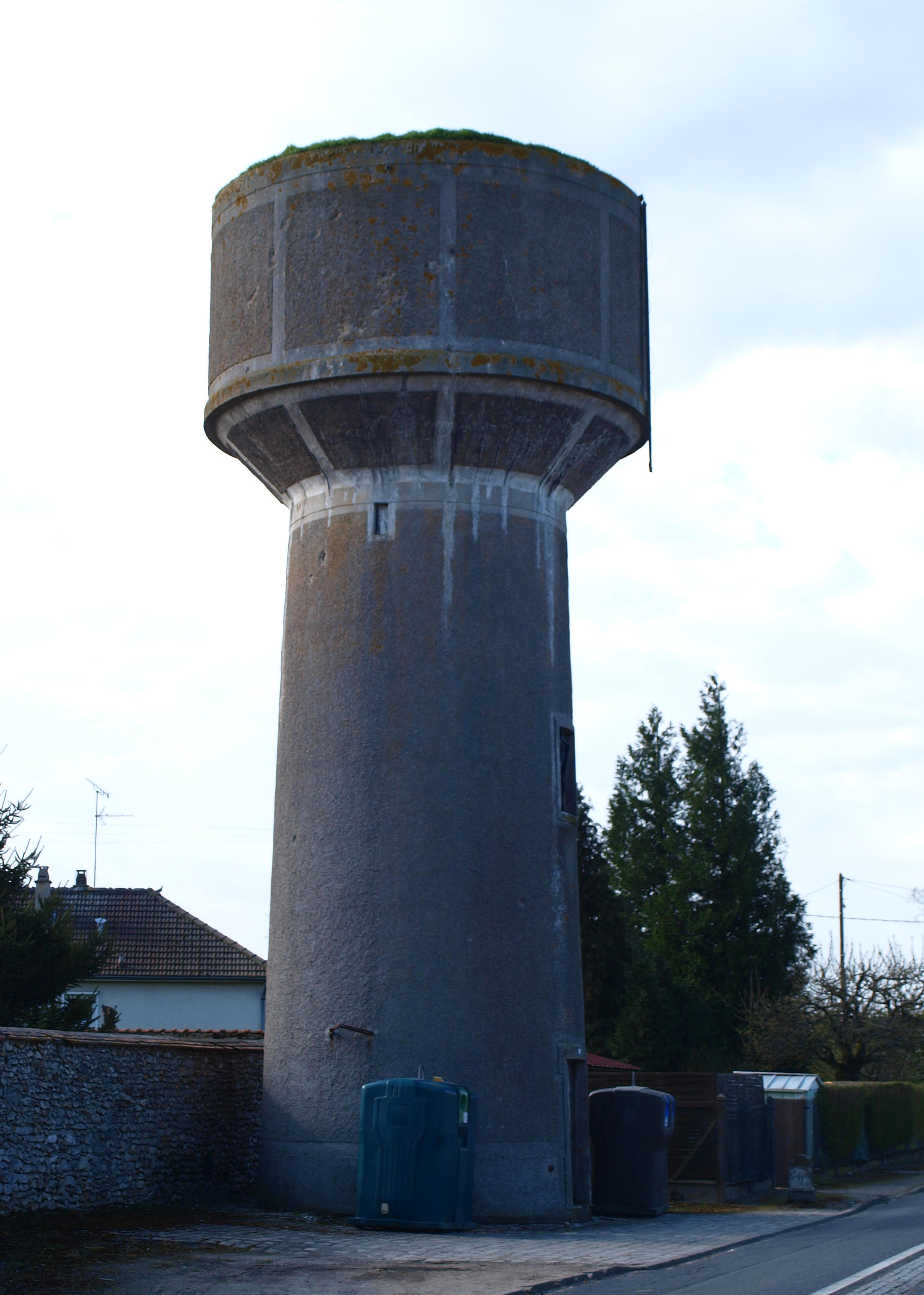 Authon-la-Plaine (Essonne, France) ; château d'eau.